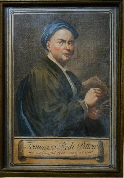 Portrait du peintre italien Tommasdo Redi, Merate (LC), Villa Confalonieri.